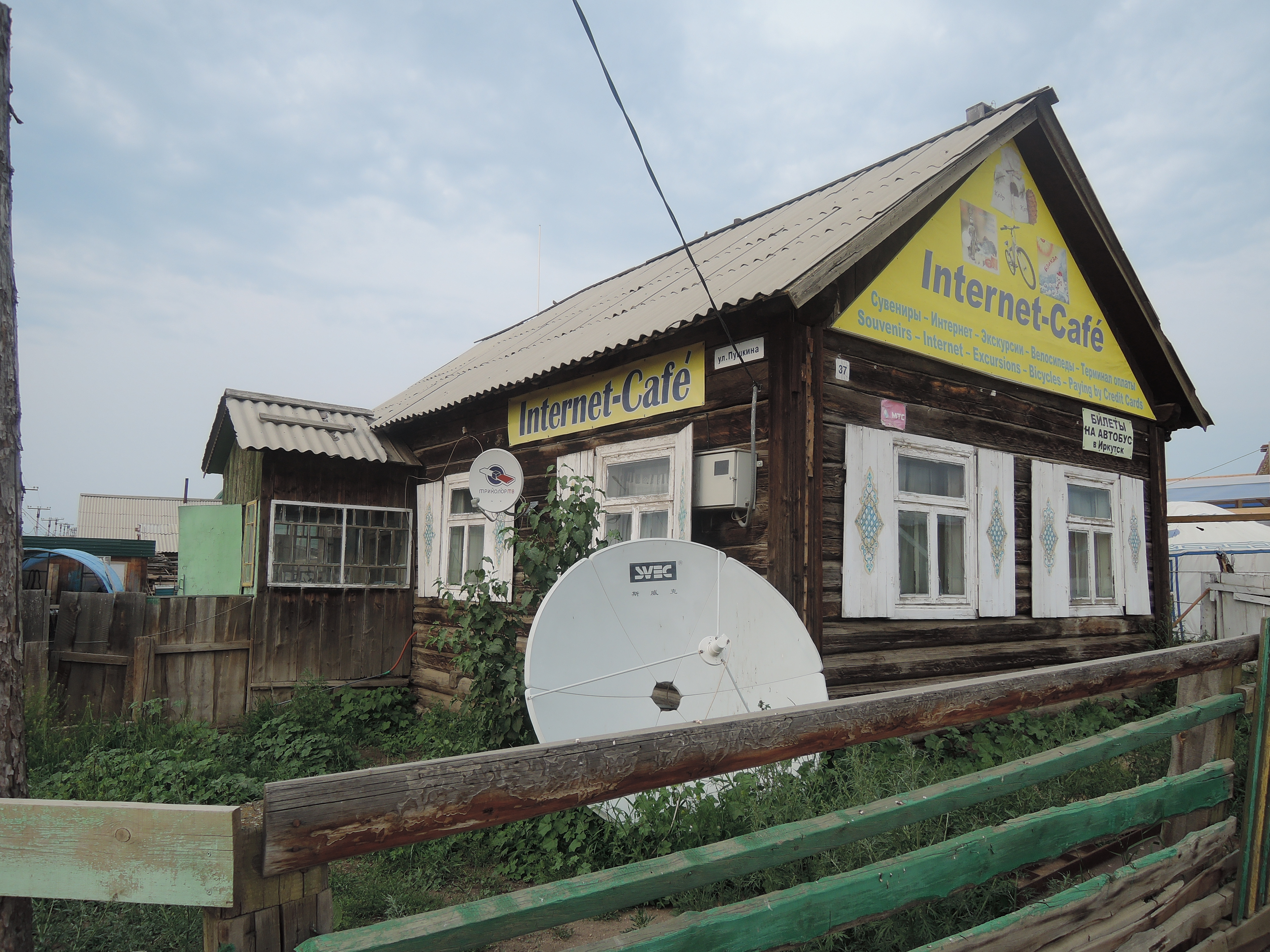 Chužírská internetová kavárna